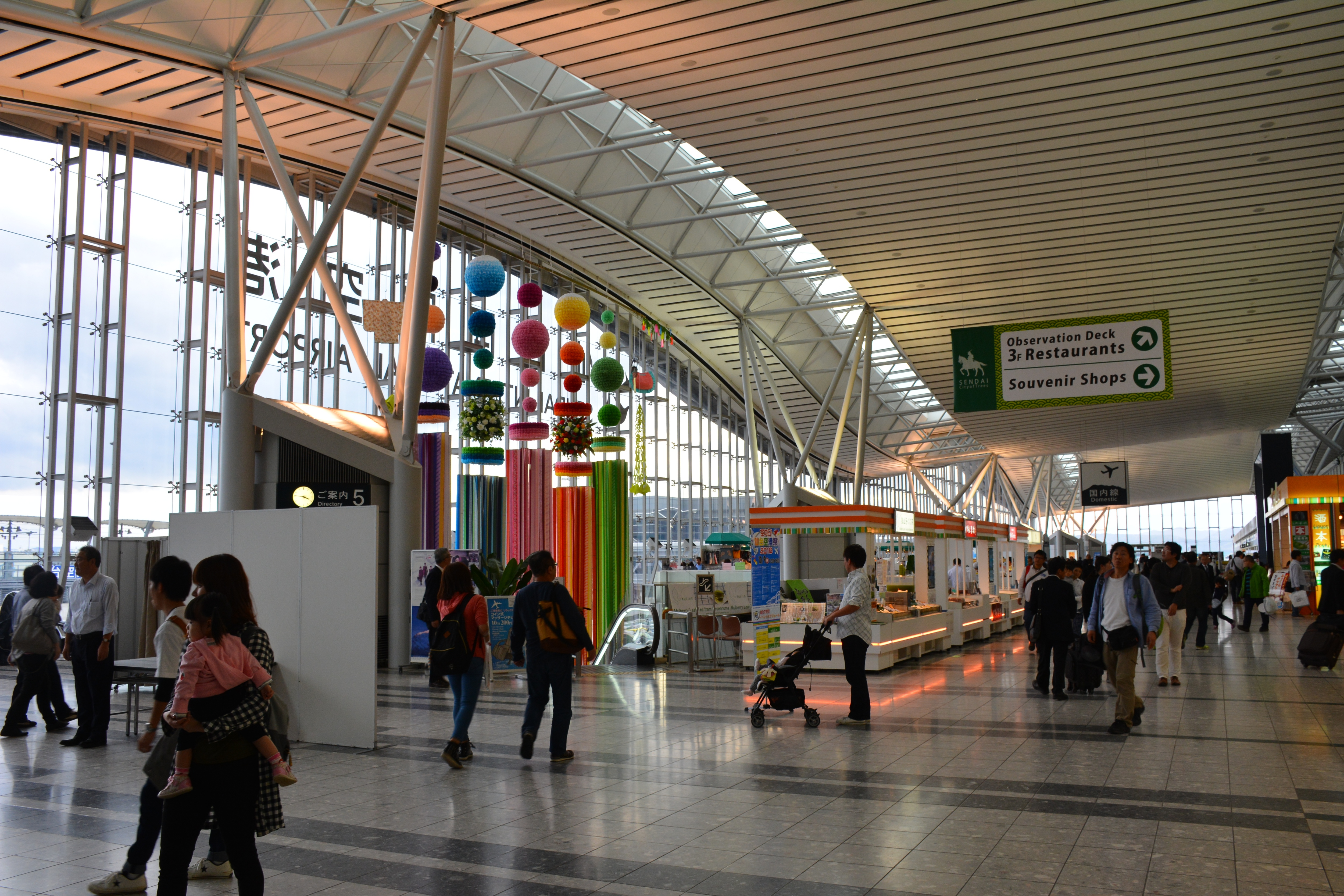 Sendai Airport